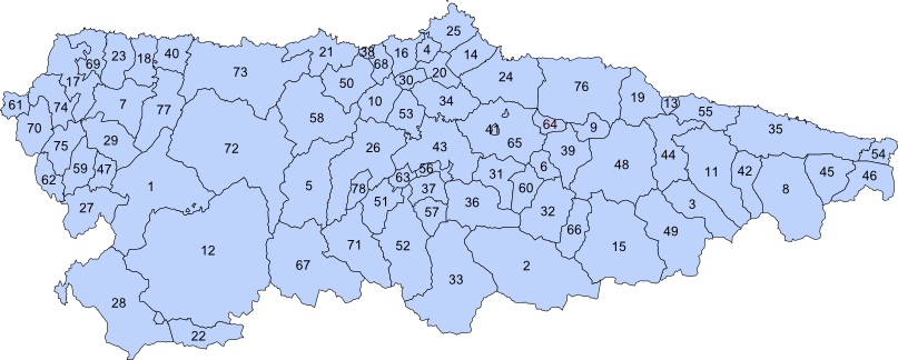 Municipios del Principado de Asturias, numerados por orden alfabético.